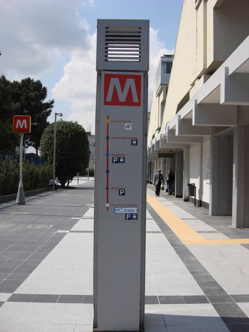 Icona "M" alla stazione di Piscinola della "linea arcobaleno"